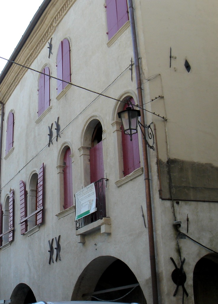 Serravalle di Vittorio Veneto (Treviso): Palazzo Casoni poco dopo il restauro.